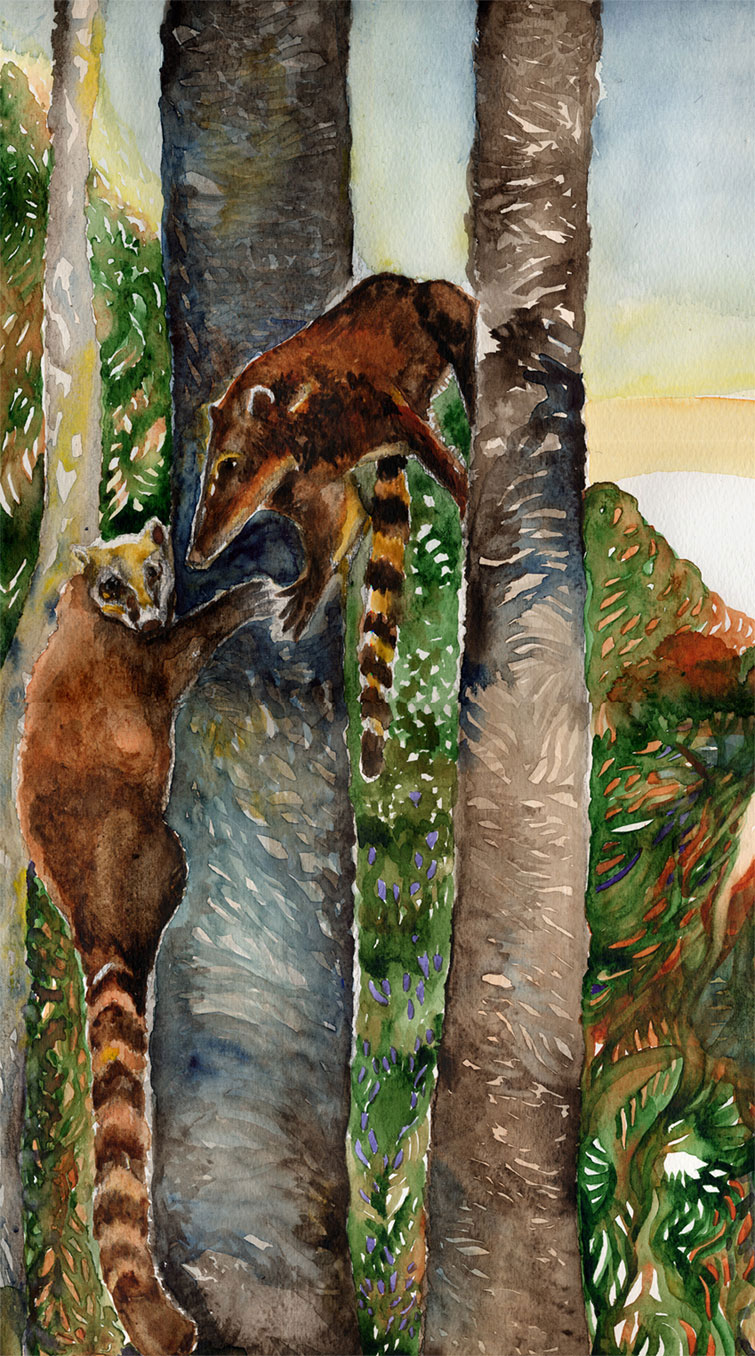 Till minnet av min melankoli. Näsbjörnar. Akvarell, 2007.